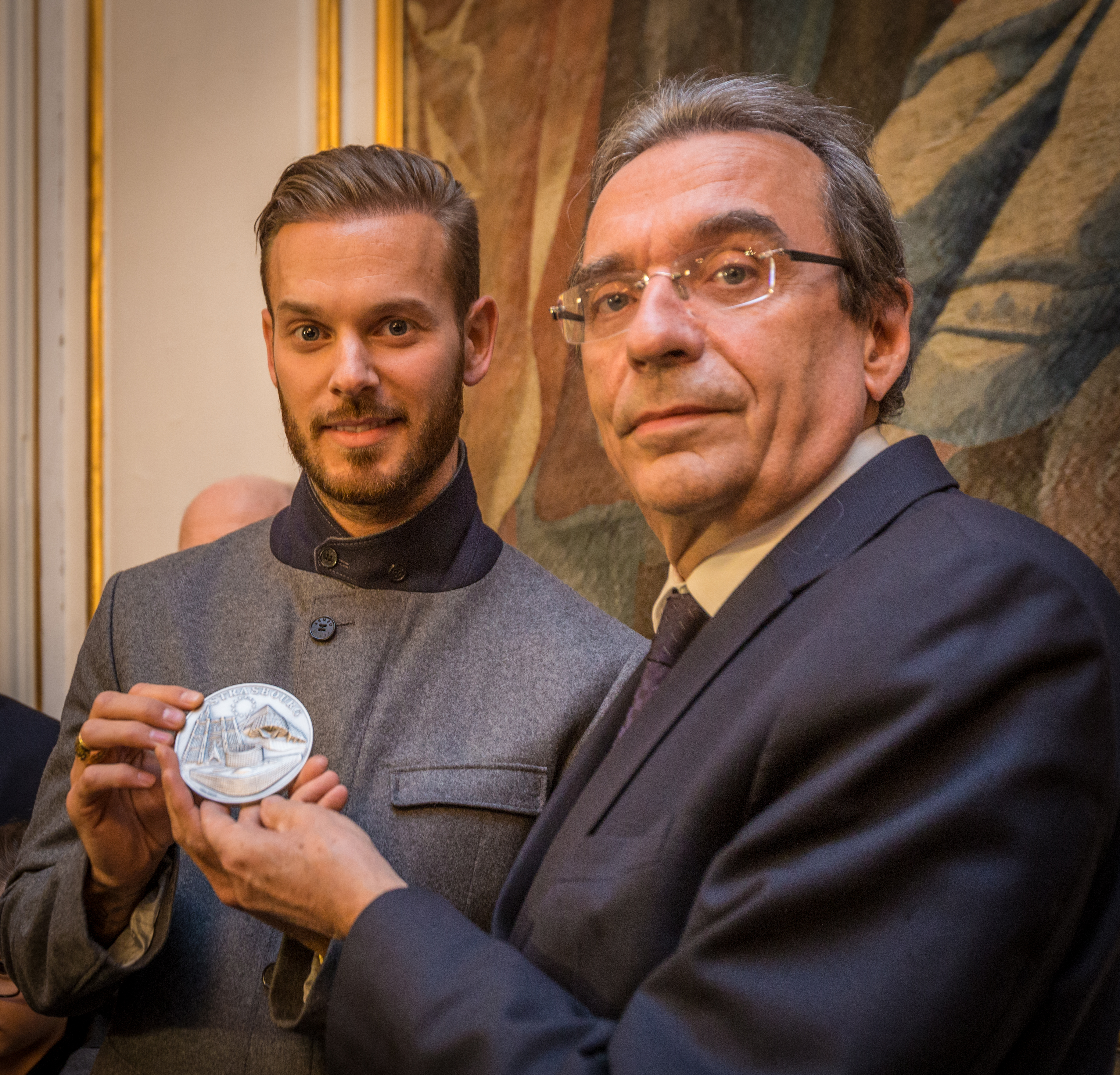 Roland Ries, maire de Strasbourg remet la médaille d’honneur de la ville de Strasbourg à M. Pokora.